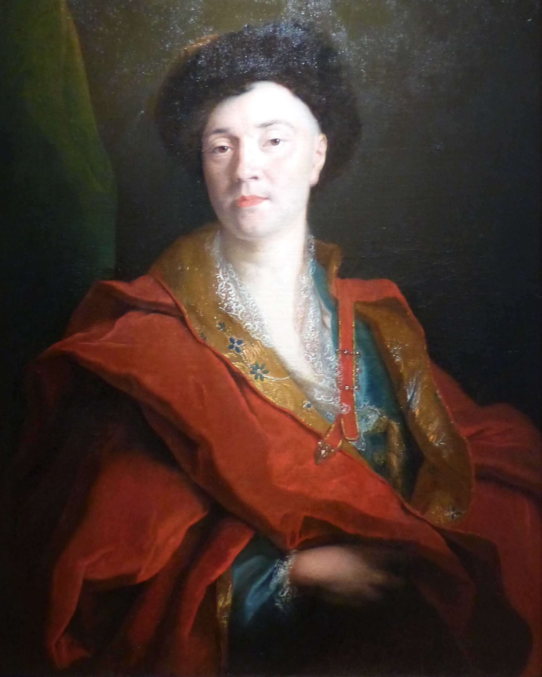 Perpignan (Pyrénées-Orientales, France), musée Hyacinthe Rigaud, collection peinture civile. L'acteur Michel Boyron dit Baron fut formé par Molière et devint un de ses amis; il joua pour Corneille et Racine.